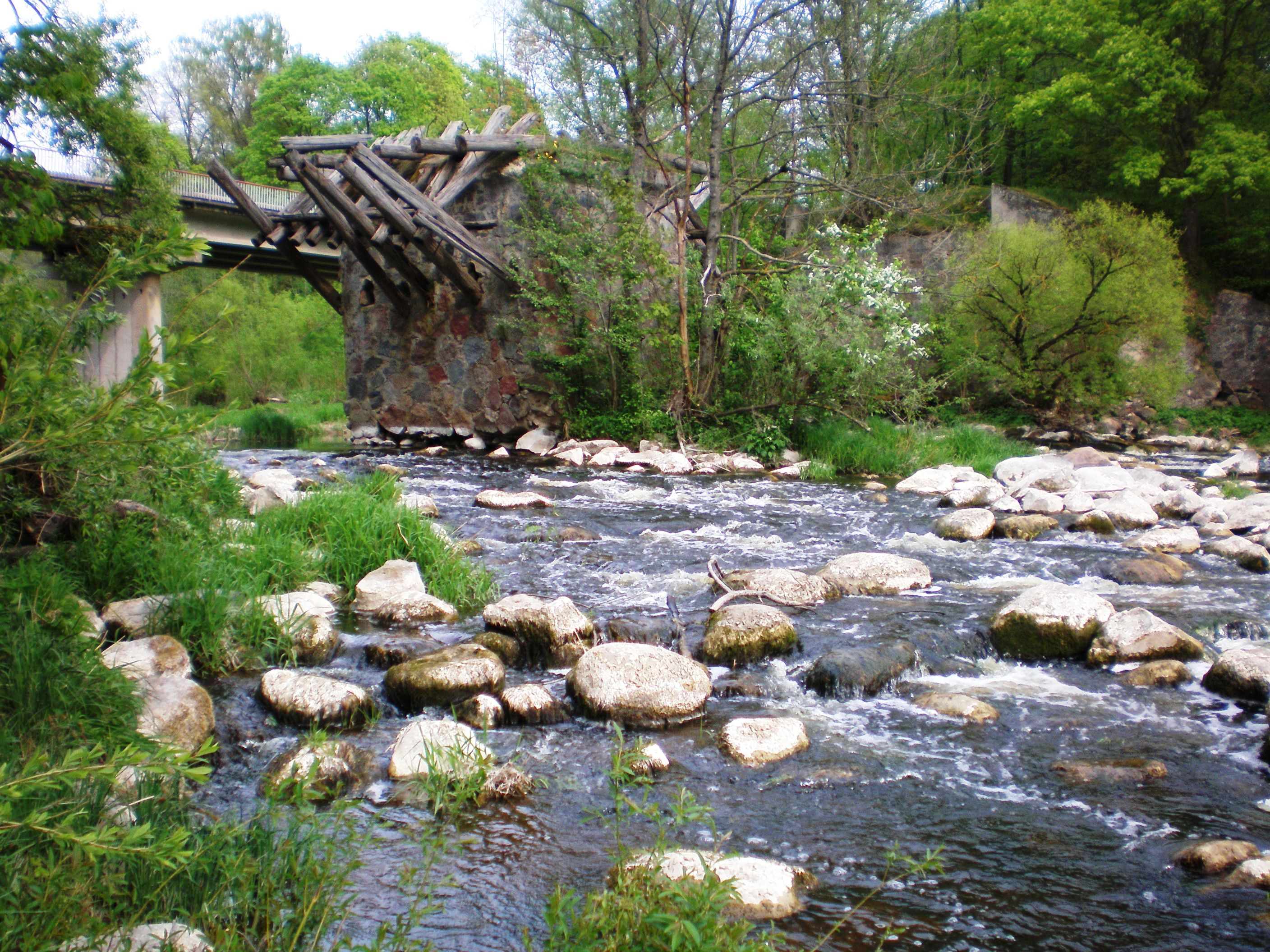 Tilto liekanos Šušvėje ties Pašušviu, Kėdainių raj.